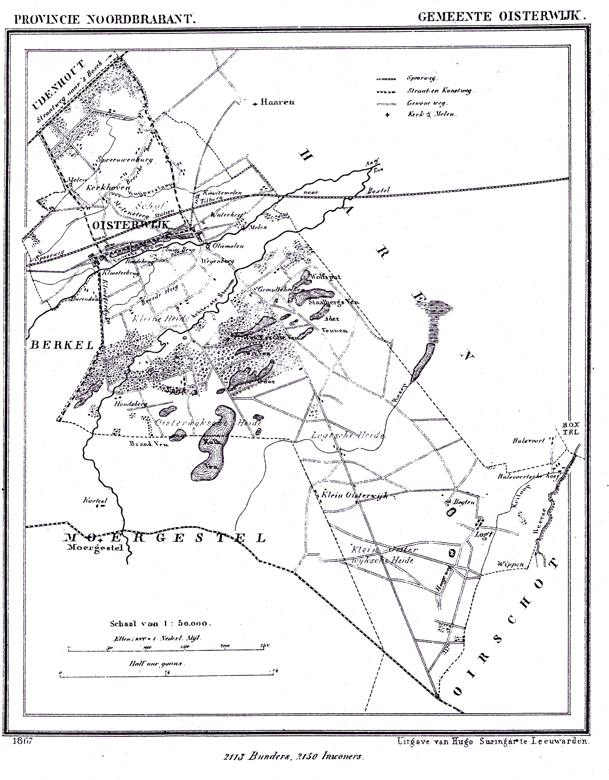 Nederland, Noord-Brabant, Gemeente Oisterwijk